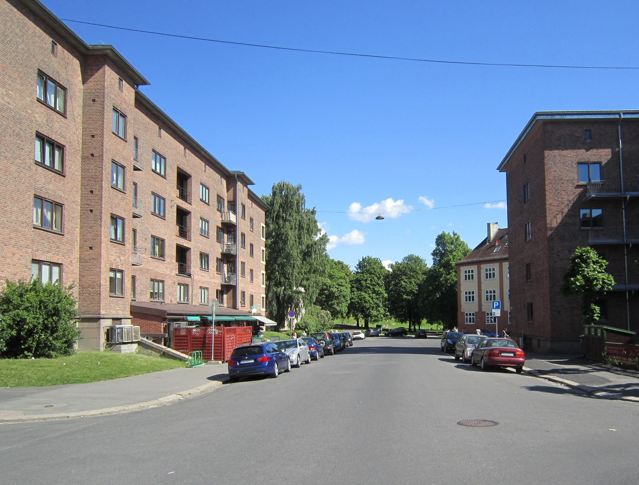 Nordkappgata på Torshov i Oslo